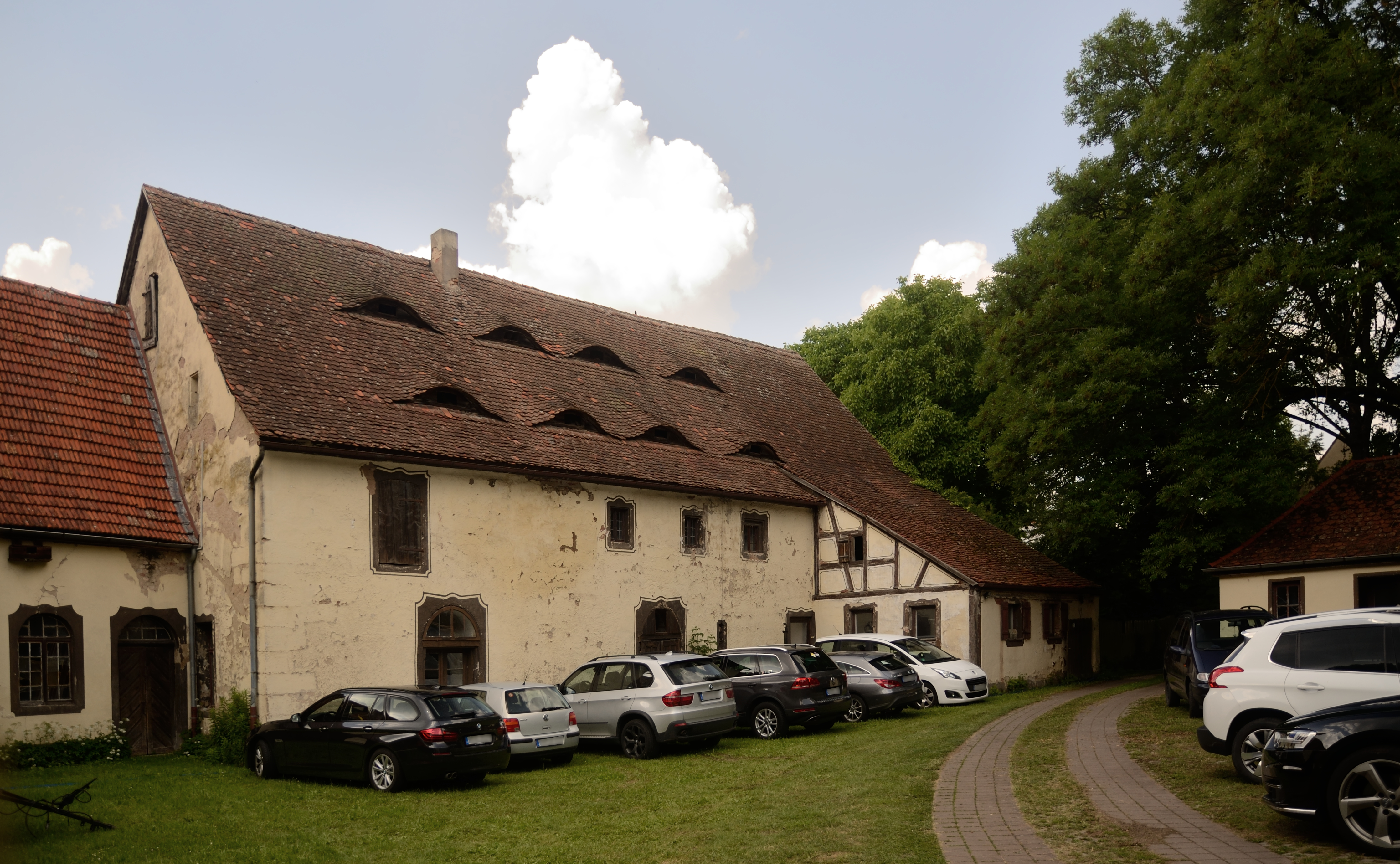 Neuendettelsauer Schloss, Zehntscheune